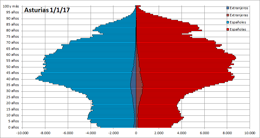 Población (españoles/extranjeros) por edad (año a año) y sexo de la comunidad autónoma de Asturias en España